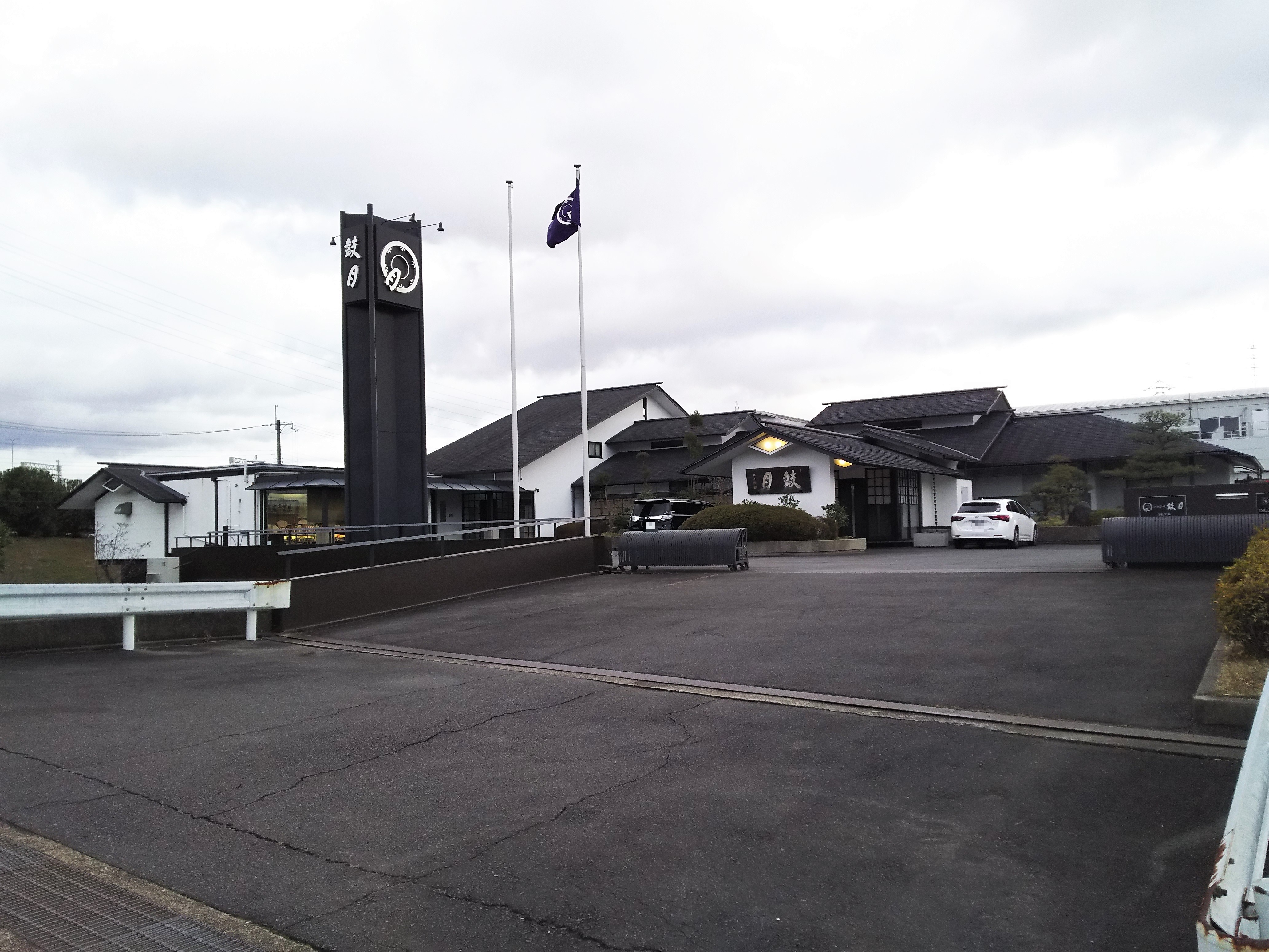 鼓月本社（京都市伏見区）